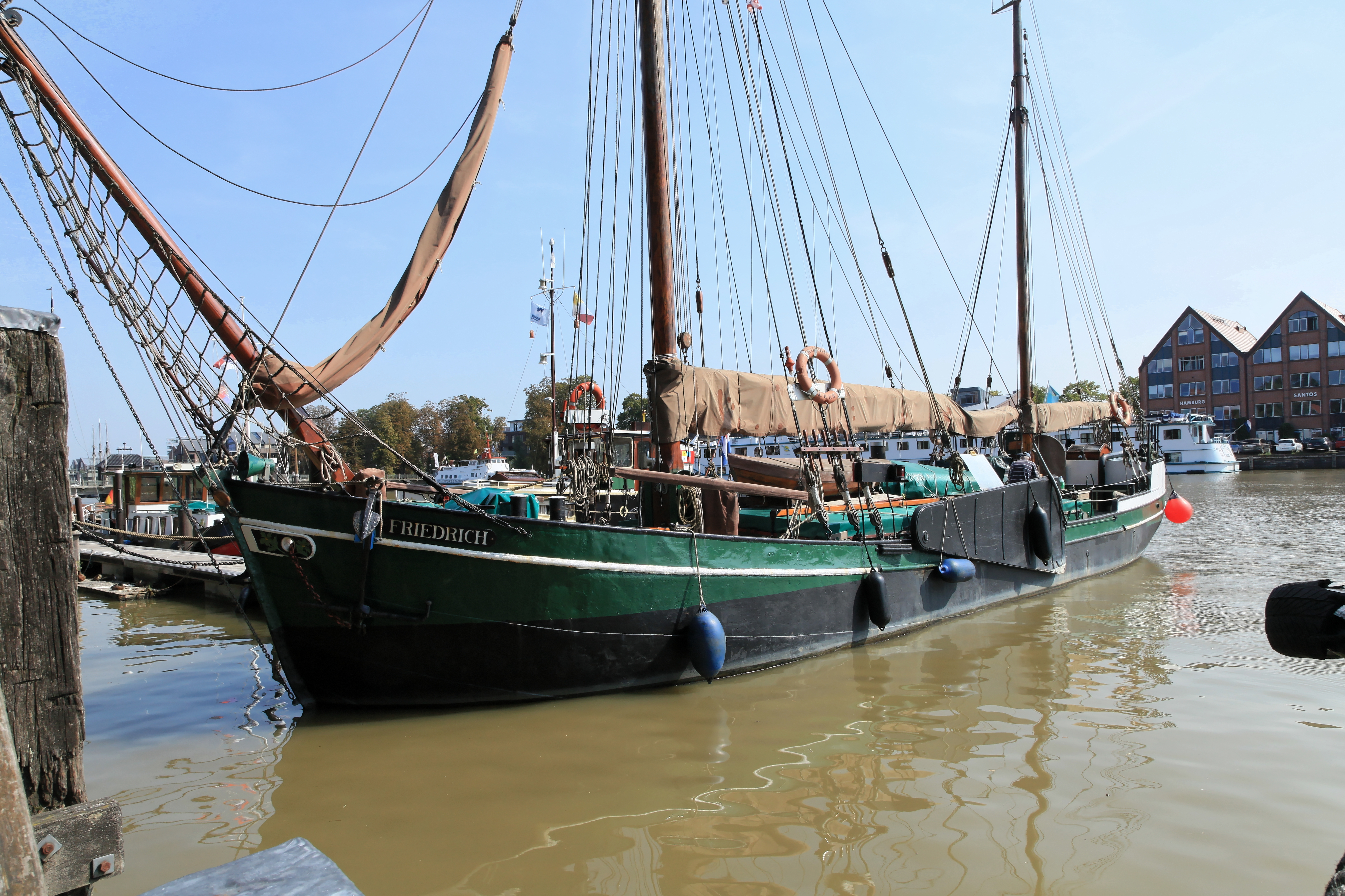 Friedrich am Museumshafen in Leer (Ostfriesland)